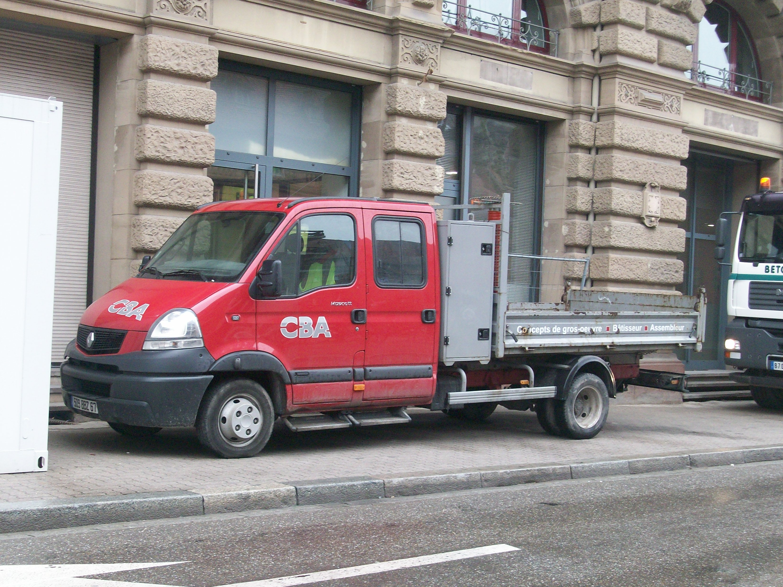 Renault Mascott à Gallia,Strasbourg